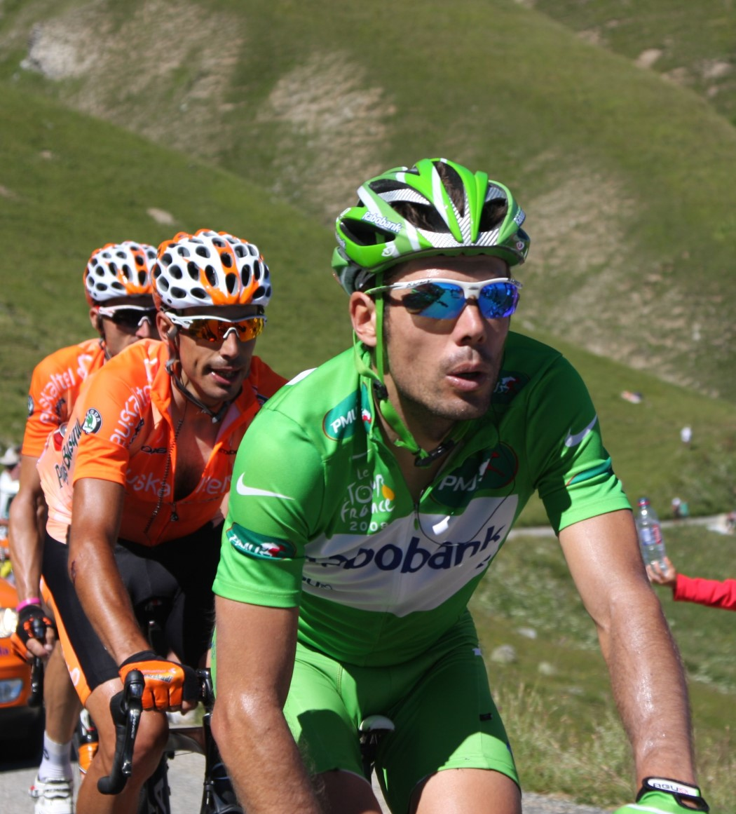 7695 zubeldia martinez freire